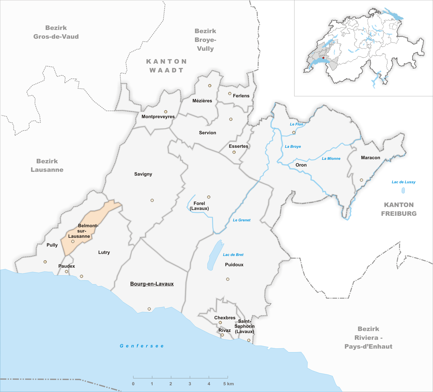 Municipality Belmont-sur-Lausanne